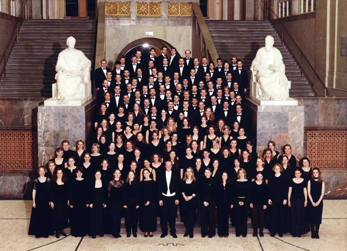 Der UniversitätsChor München in der Ludwig-Maximilians-Universität